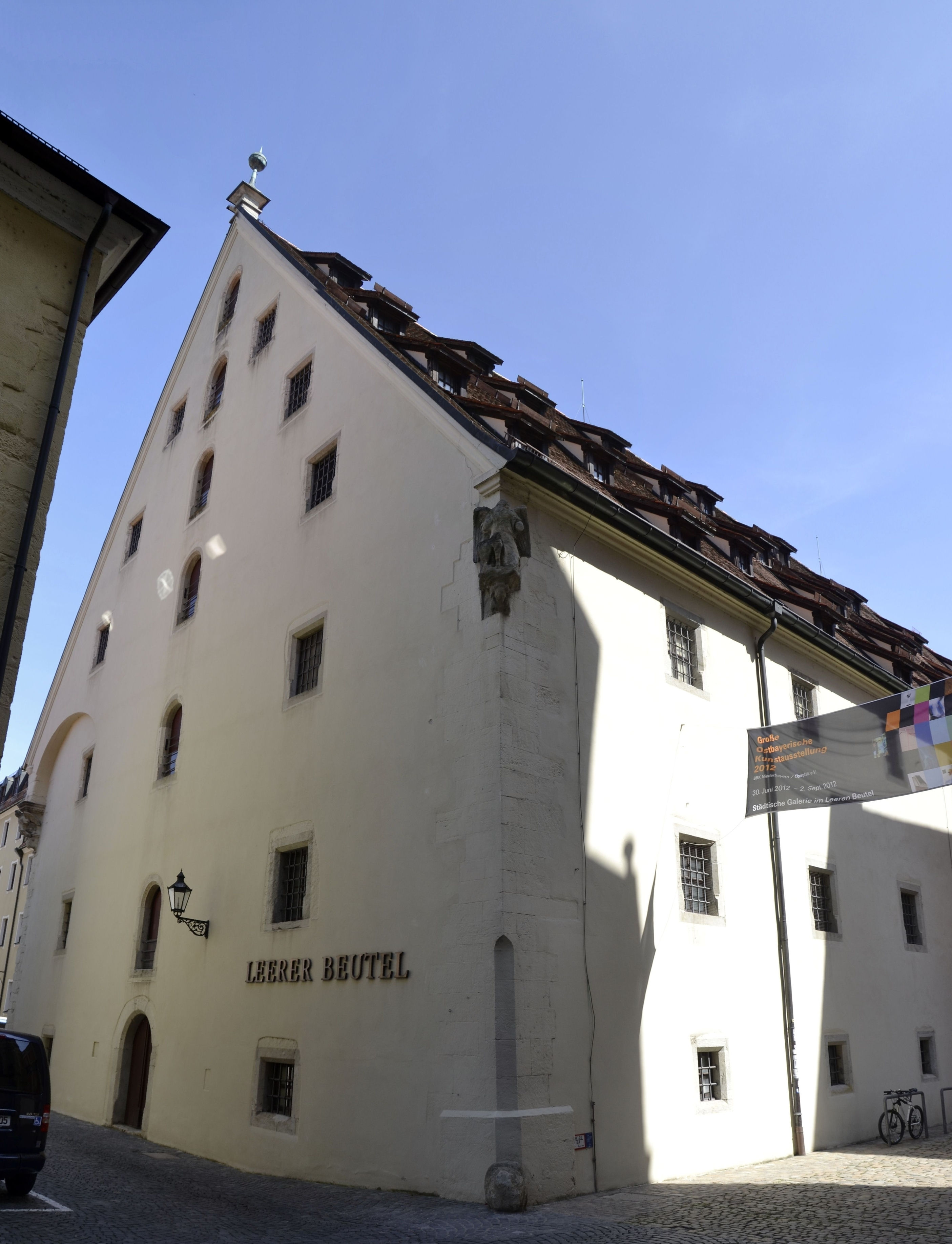 Der Leere Beutel in Regensburg.